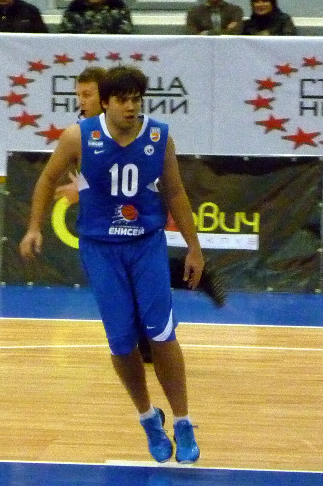 Защитник БК «Енисей» Павел Сергеев в матче против БК «Нижний Новгород» 18 декабря 2010 года